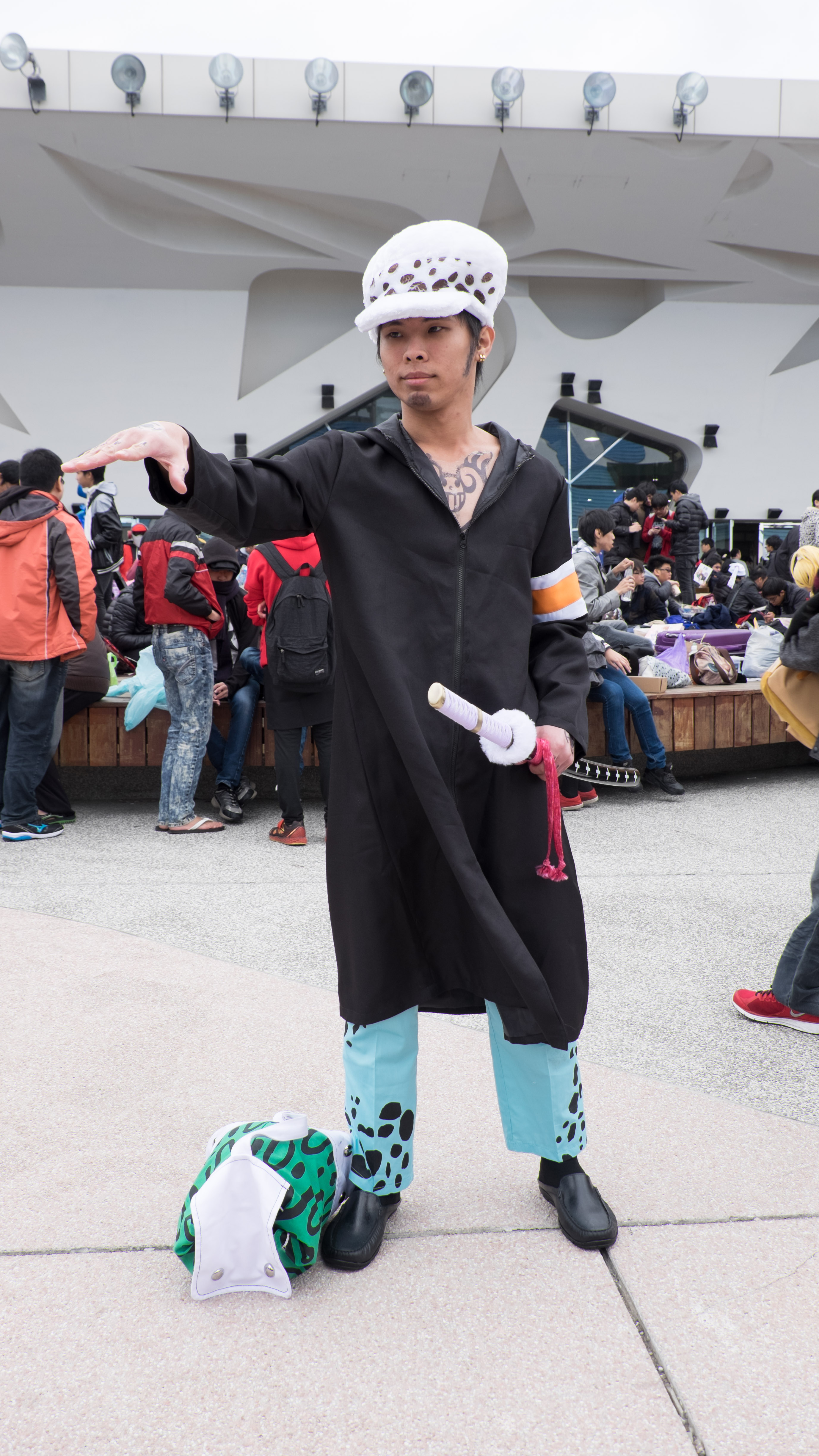 FF25第一日下午，＜One Piece＞托拉法爾加·羅Cosplayer。